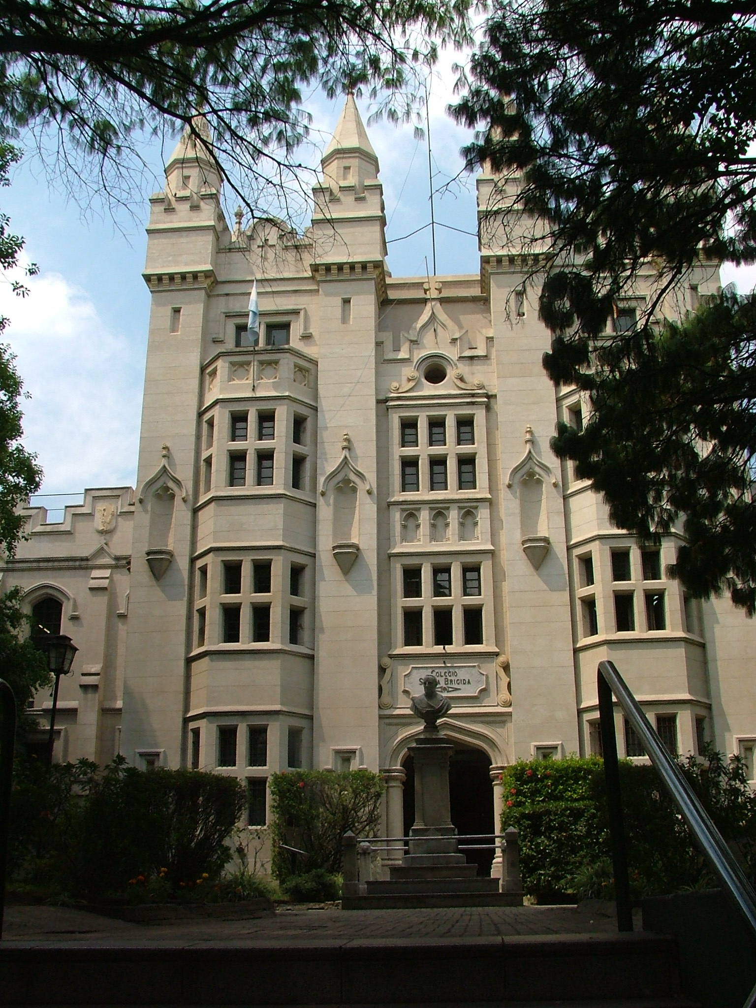 Instituto Santa Brígida. Pabellón principal.